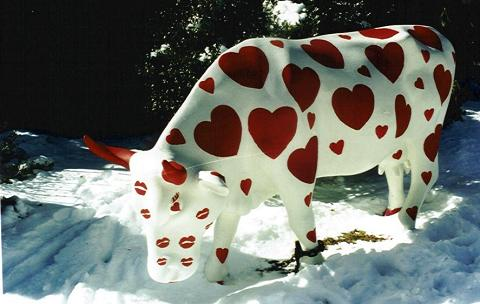 Gladys as a Valentine